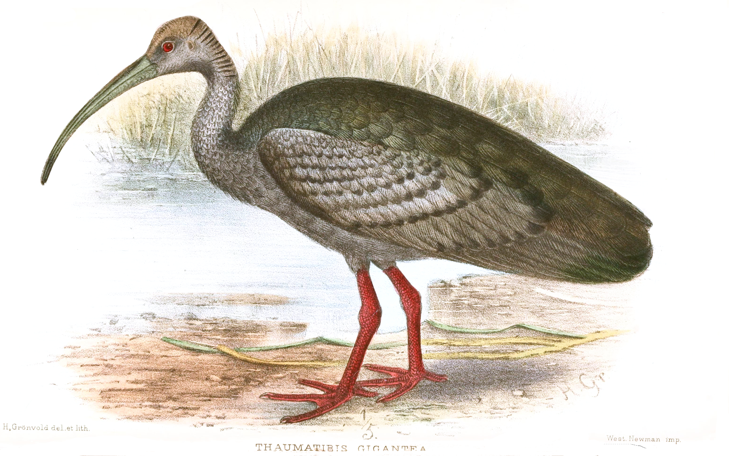 Thamantibis gigantea